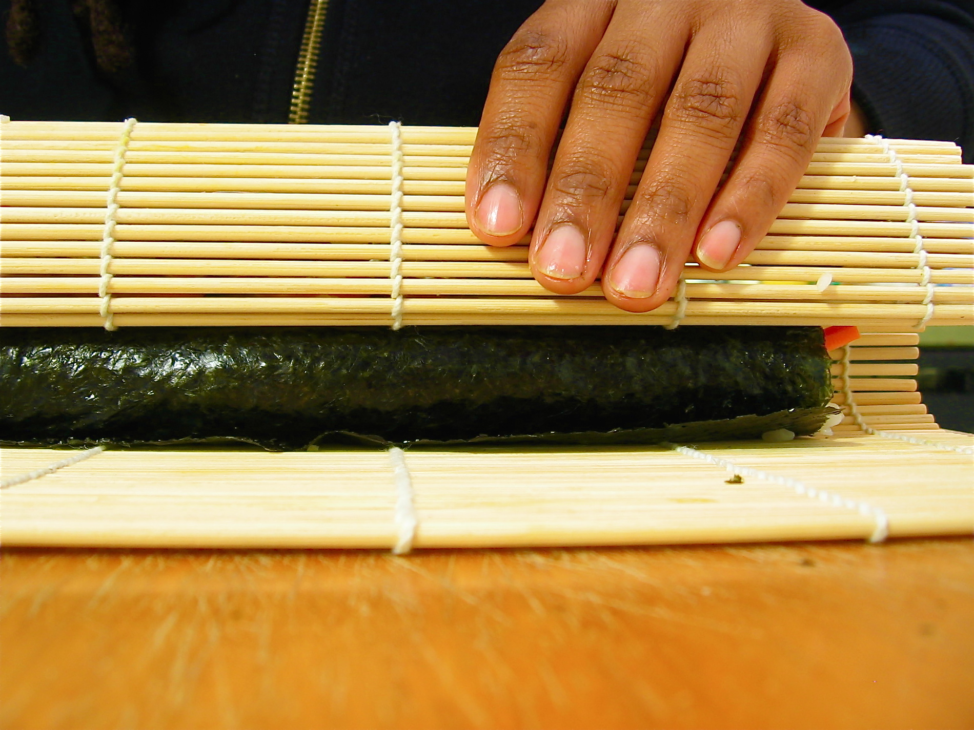 He made veggie rolls.